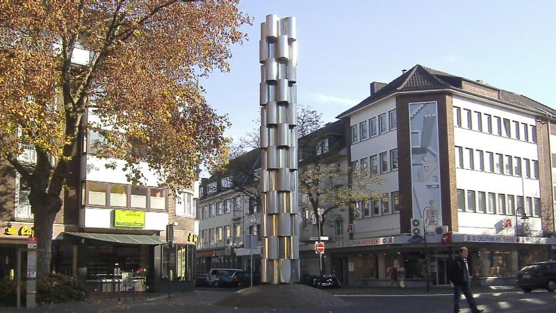 Brunnensäule an der Hauptstraße in Viersen, NRW, Deutschland.